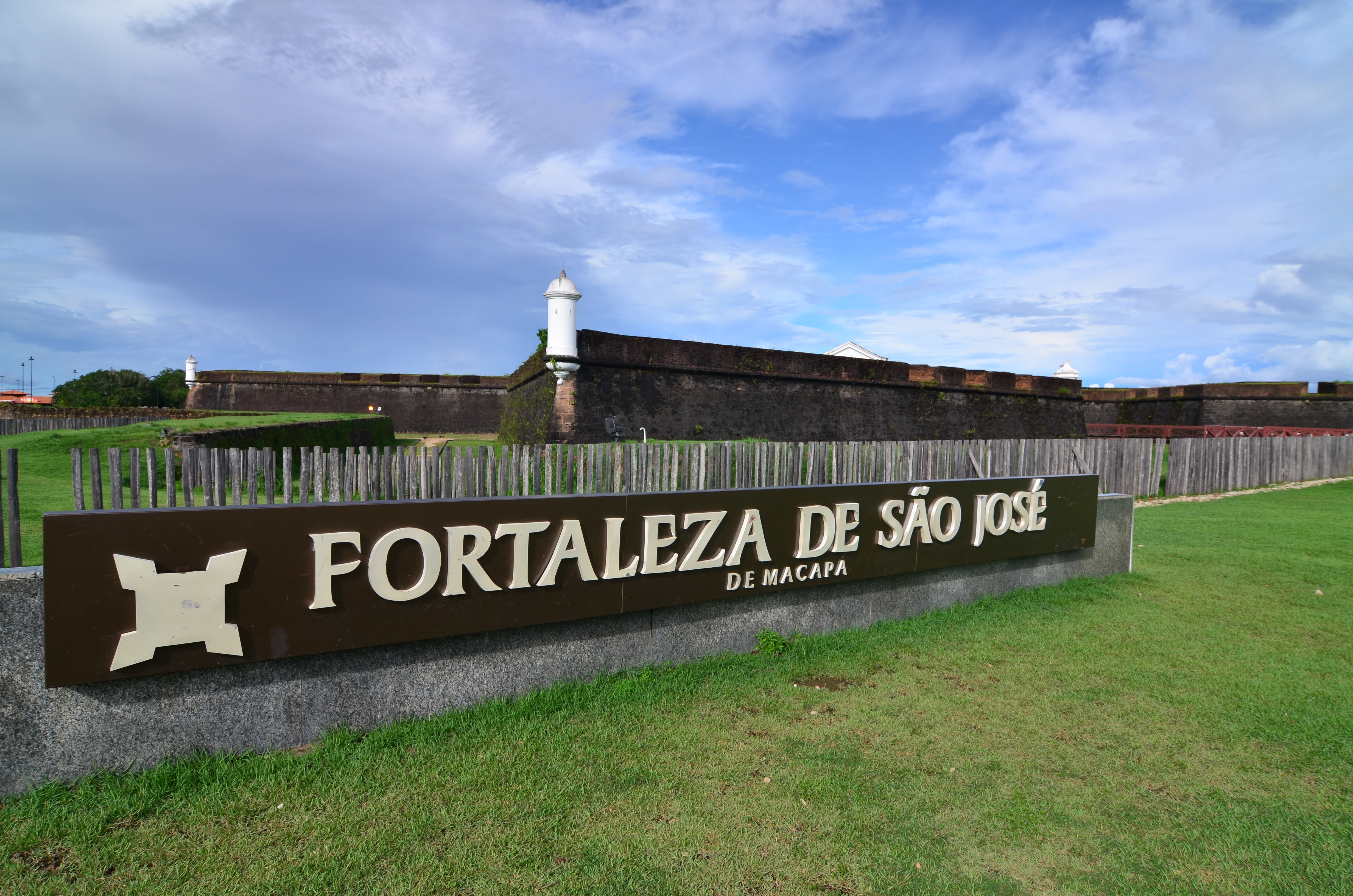 Fortaleza de São José de Macapá